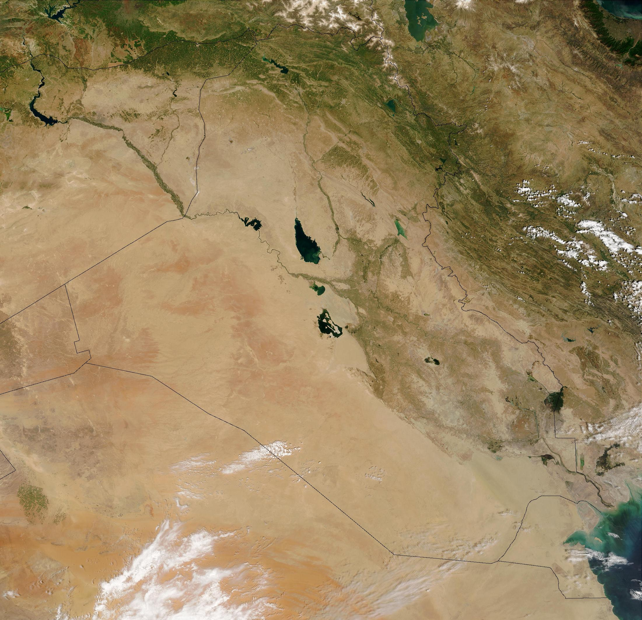 Iraq